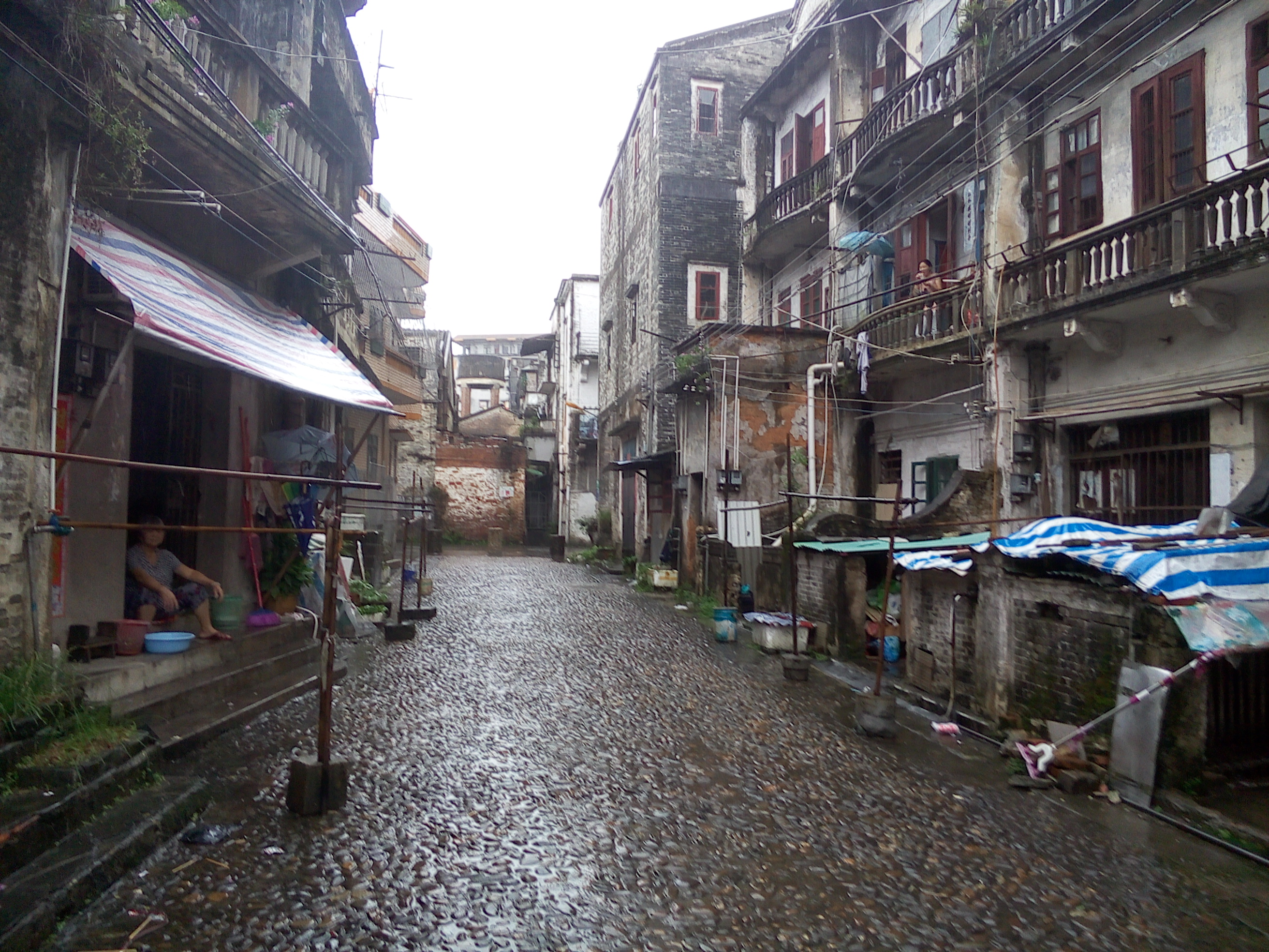 Chikan, Kaiping